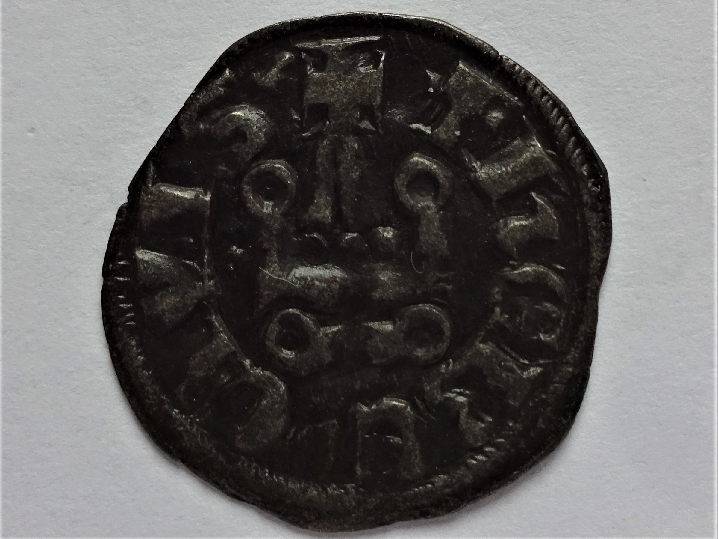 Rückseite des Denars von Guy I. de la Roche, vgl. Metcalf 1038 var